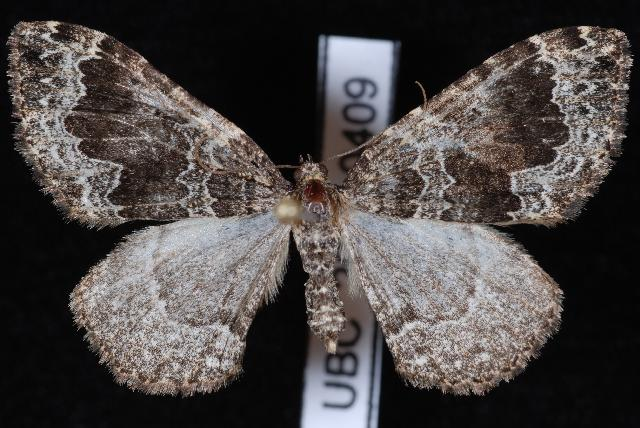 Antepirrhoe semiatrata